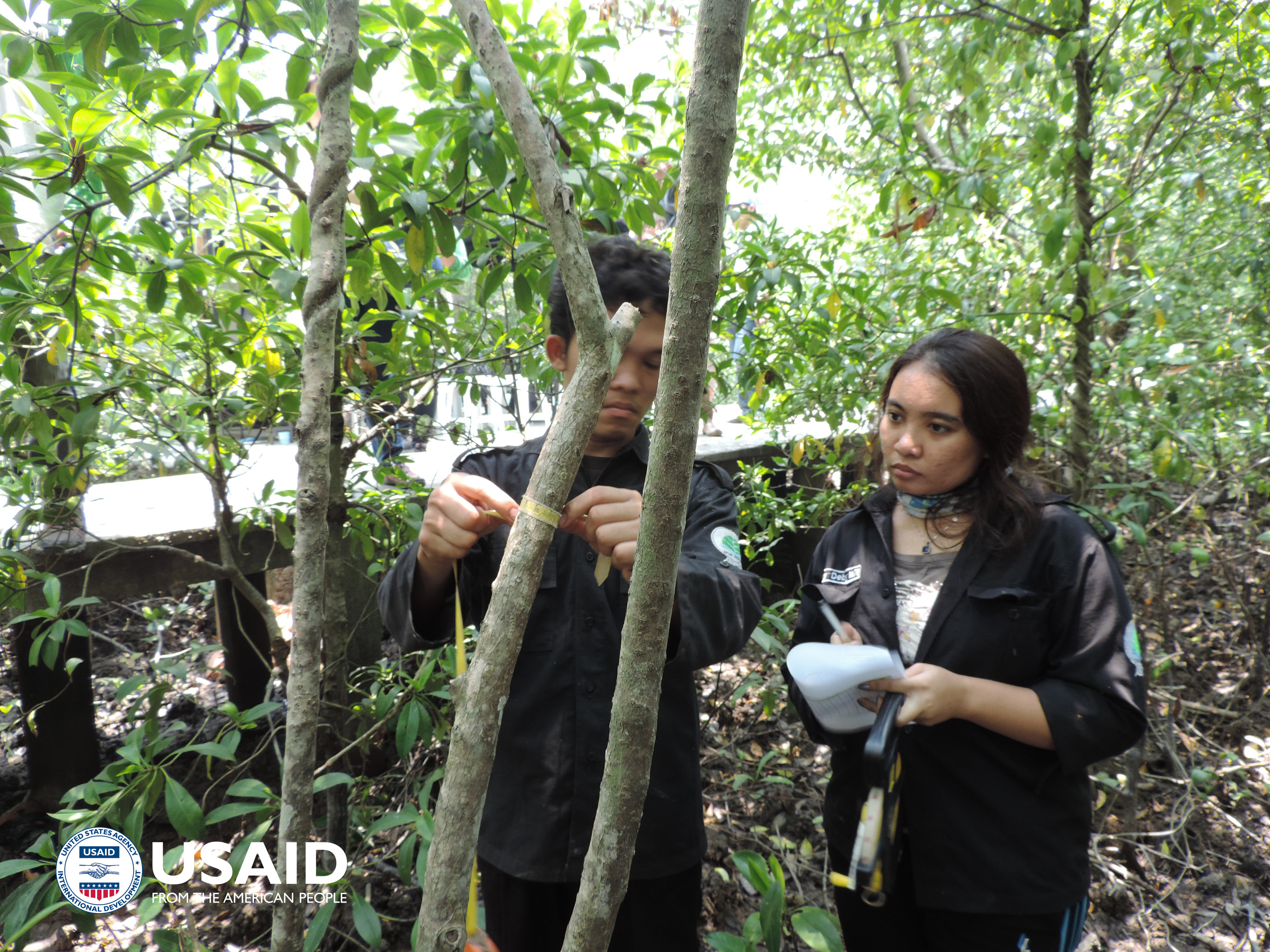 Para peneliti muda yang tergabung di YAGASU sedang mengukur lingkar batang untuk menentukan usia pohon. USAID memberikan dukungan untuk restorasi hutan bakau yang menjadi tempat berkembang biak berbagai jenis ikan dan kepiting. Photo by: USAID Indonesia/A. Djogo